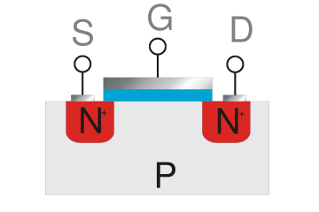 Popis: NMOS Zapnuty Zdroj: Robo Dátum: 4.4.2006 Autor: Robo Povolenie: Free Iné verzie tohto súboru: Nie